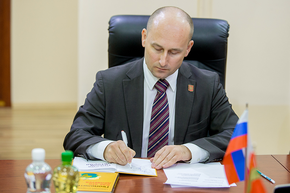 Николай Стариков — российский общественный и политический деятель